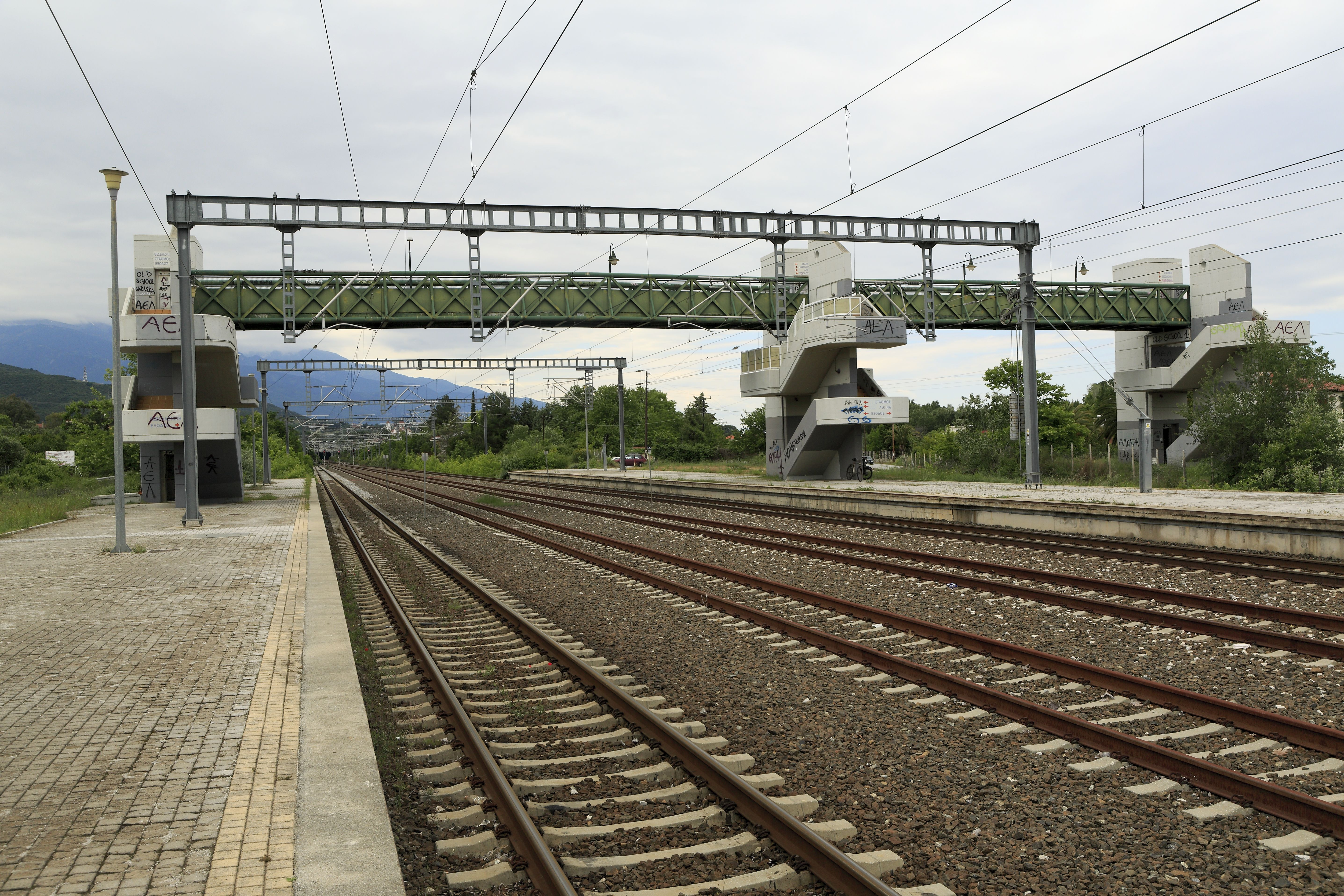 Der Bahnhof entstand im Rahmen des Neubaues der Strecke Athína–Thessaloníki zwischen Platí und Lárisa um 2000. Geld spielte kaum eine Rolle, man richtete sich am Ausbaustandard für Schnellfahrstrecken mit Bahnsteigen nur an Randgleisen. Praktisch verkehren alle Züge über die Bahnsteiggleise, die durchgehenden Hauptgleise sind sichtbar ungenutzt. Richtung Norden, die Fußgängerbrücke ist mit drei zum Aufnahmezeitpunkt allerdings gestörten Aufzügen ausgerüstet. Der dritte Aufgang ganz rechts war nur solange sinnvoll, wie die alte Strecke über Platamonas, die nach rechts abzweigt, in Betrieb war.